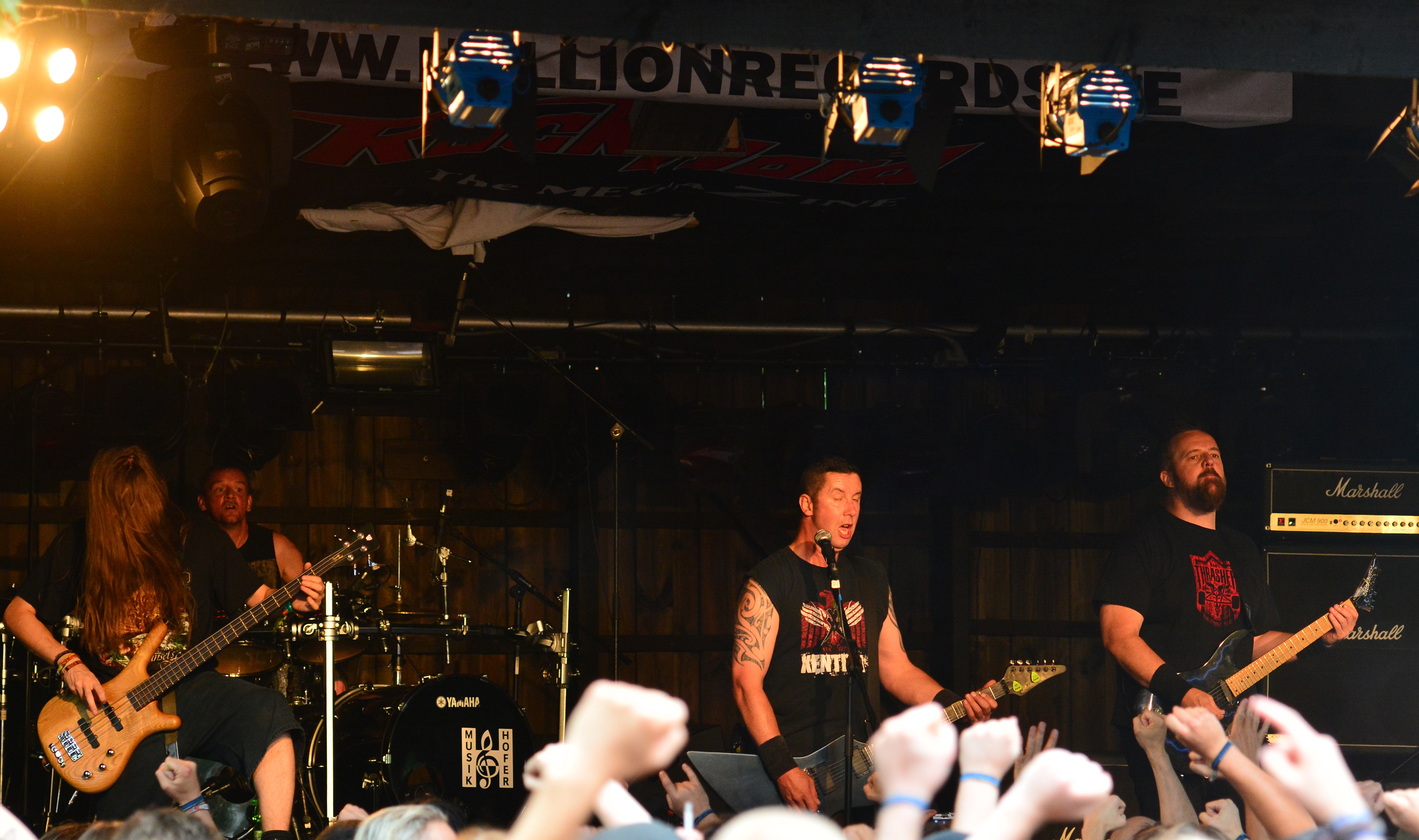 Xentrix beim Headbangers Open Air 2014